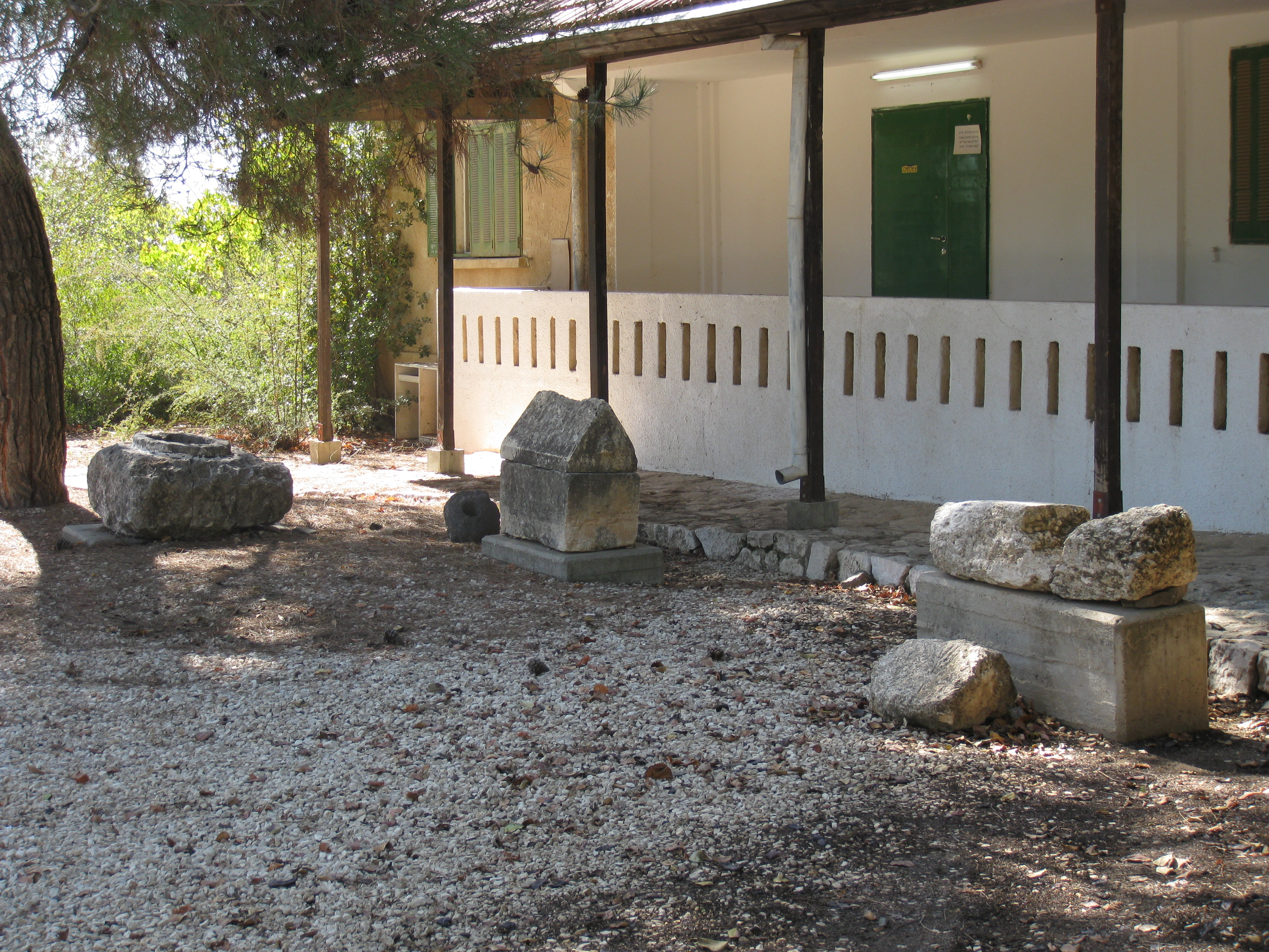 Kfar Etzion כפר עציון